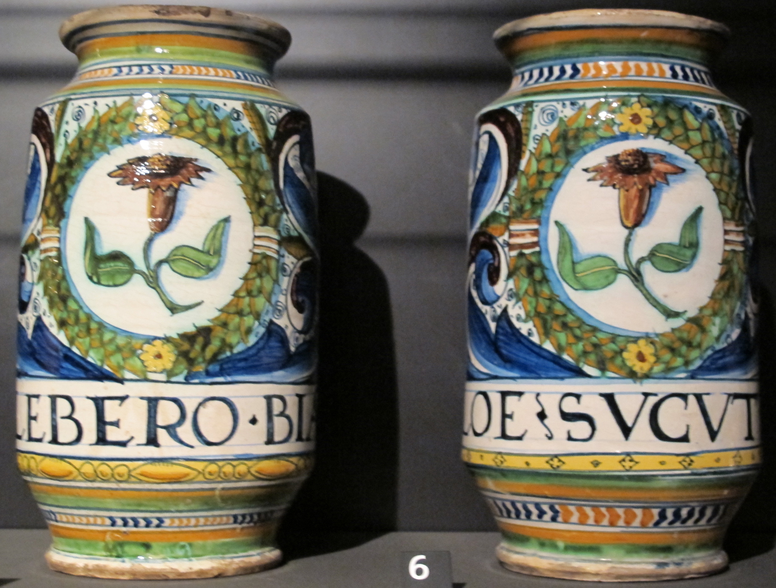 Toscana, albarelli da farmacia per elleboro, 1490-1500 ca.